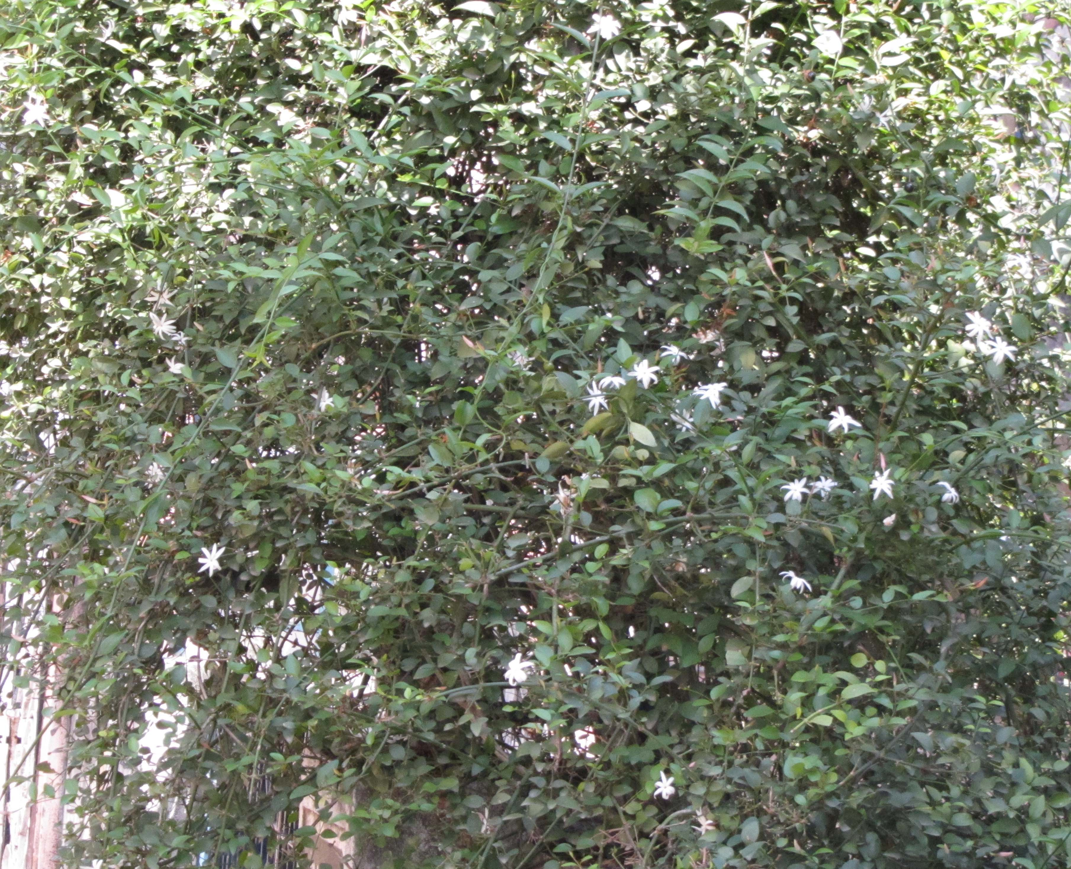 own shot இந்த வகை முல்லைக்குத்தான் சங்ககாலப் பாரி வள்ளல் தேர் வழங்கினான்.